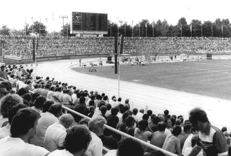 Dresden, Heinz-Steyer-Stadion ADN-ZB Kluge 11.8.1986 Dresden: Das Heinz-Steyer-Stadion ist am 16. und 17. August 1986 Austragungsort des Nationalen Leichtathletik-Sportfestes "Goldenes Oval". Die gesamte DDR-Spitzenklasse, darunter auch die Kandidaten für die Leichtathletik-EM in Stuttgart, wird in verschiedenen Lauf-, Sprung-, Stoß- und Wurfdisziplinen ihre Kräfte messen.